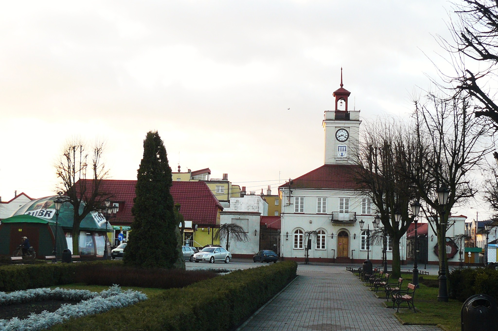 Rynek w Gostyninie. Ratusz.